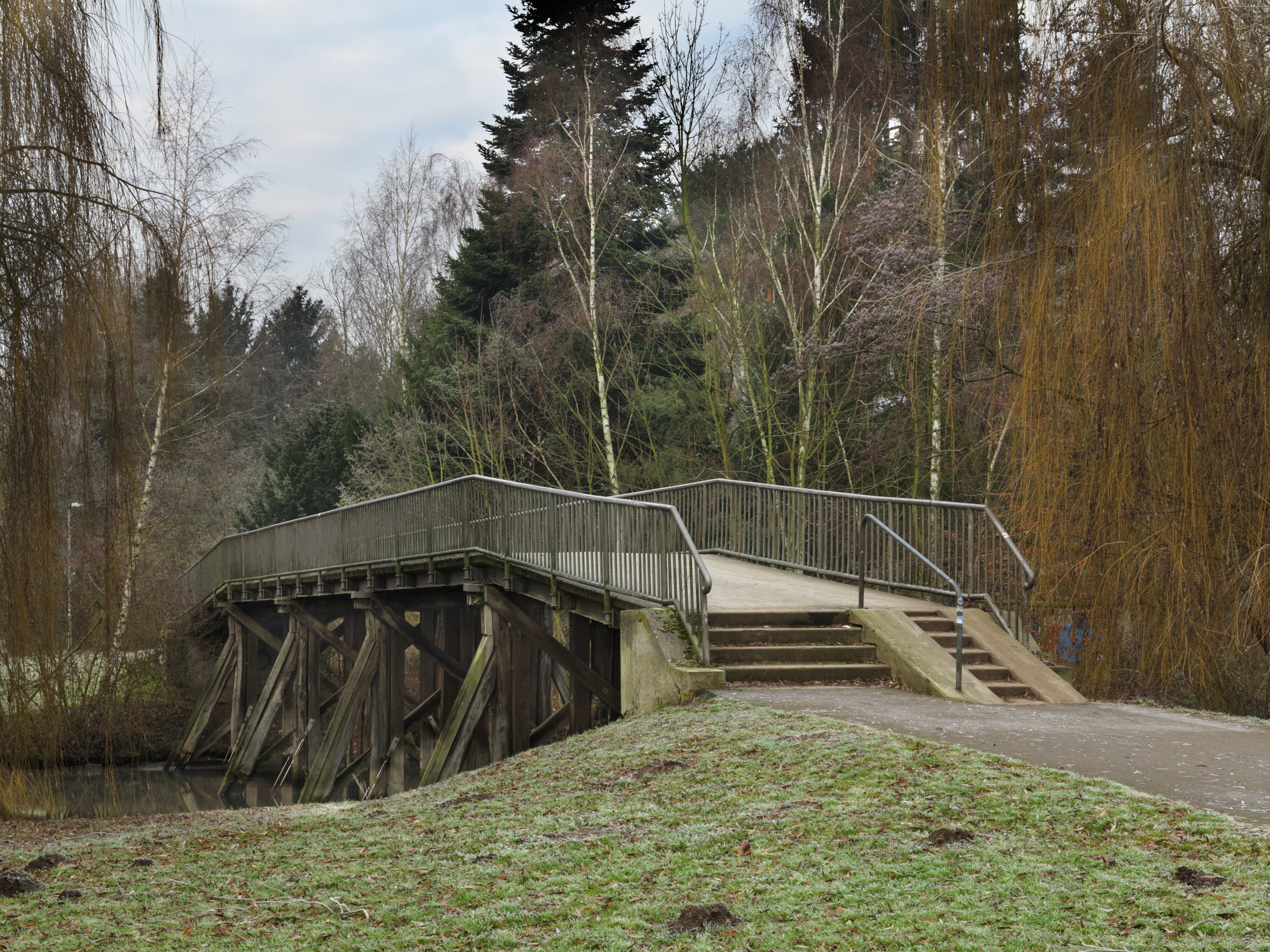 Braunschweig: die Hoheworthbrücke im Bürgerpark bis 2019